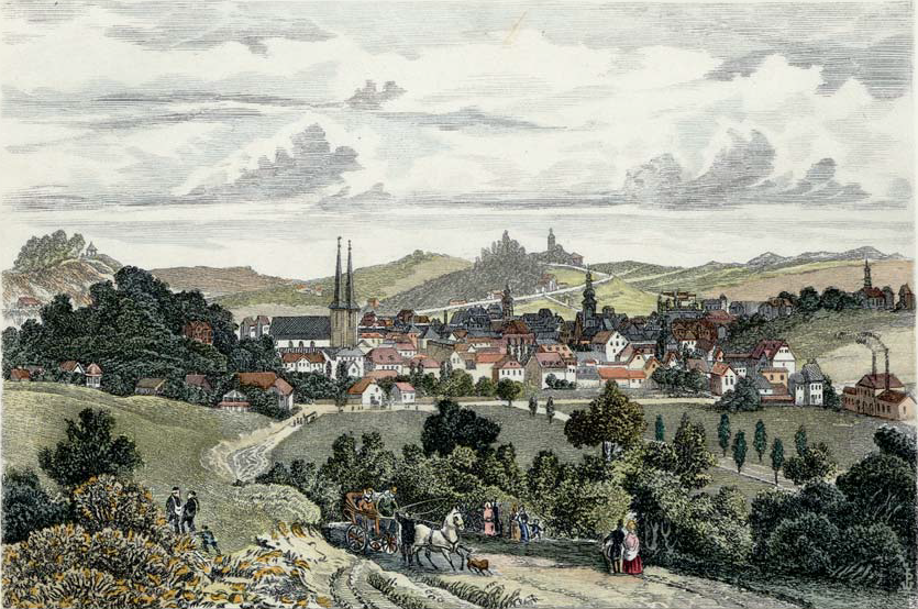 Elberfeld um 1850, colorierte Radierung von W. Peters (Wilhelm Peters (1817–1903)?), Historisches Zentrum Wuppertal